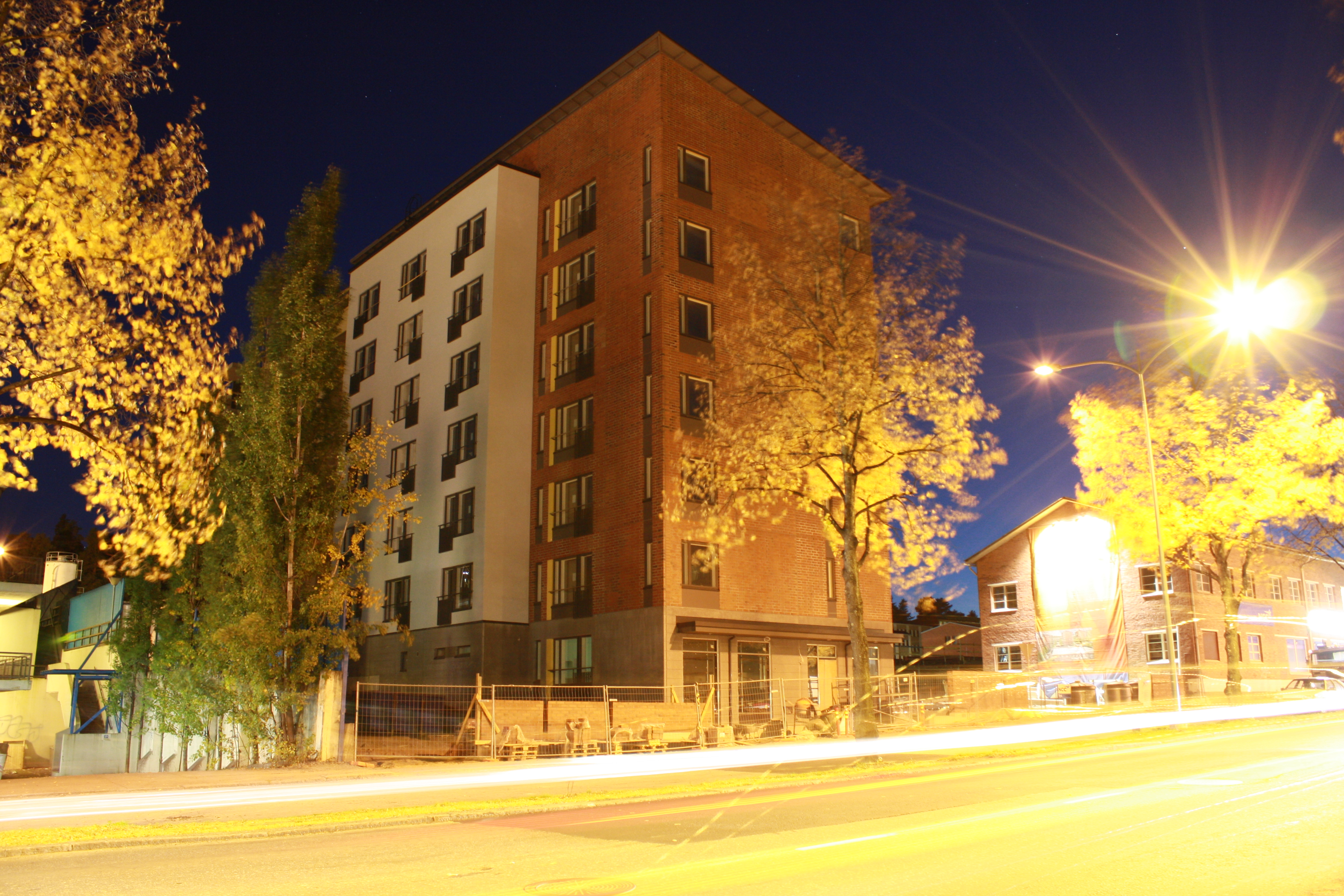 Tampereen seudun opiskelija-asuntosäätiön (TOAS) Jarinsampo-talo (285) Kalevanrinteen kaupunginosassa Tampereella.